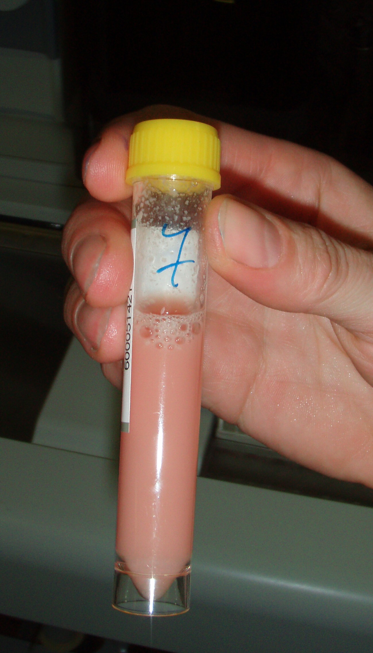 purulent (pyic) cerebro-spinal fluid (CSF, Liquor)